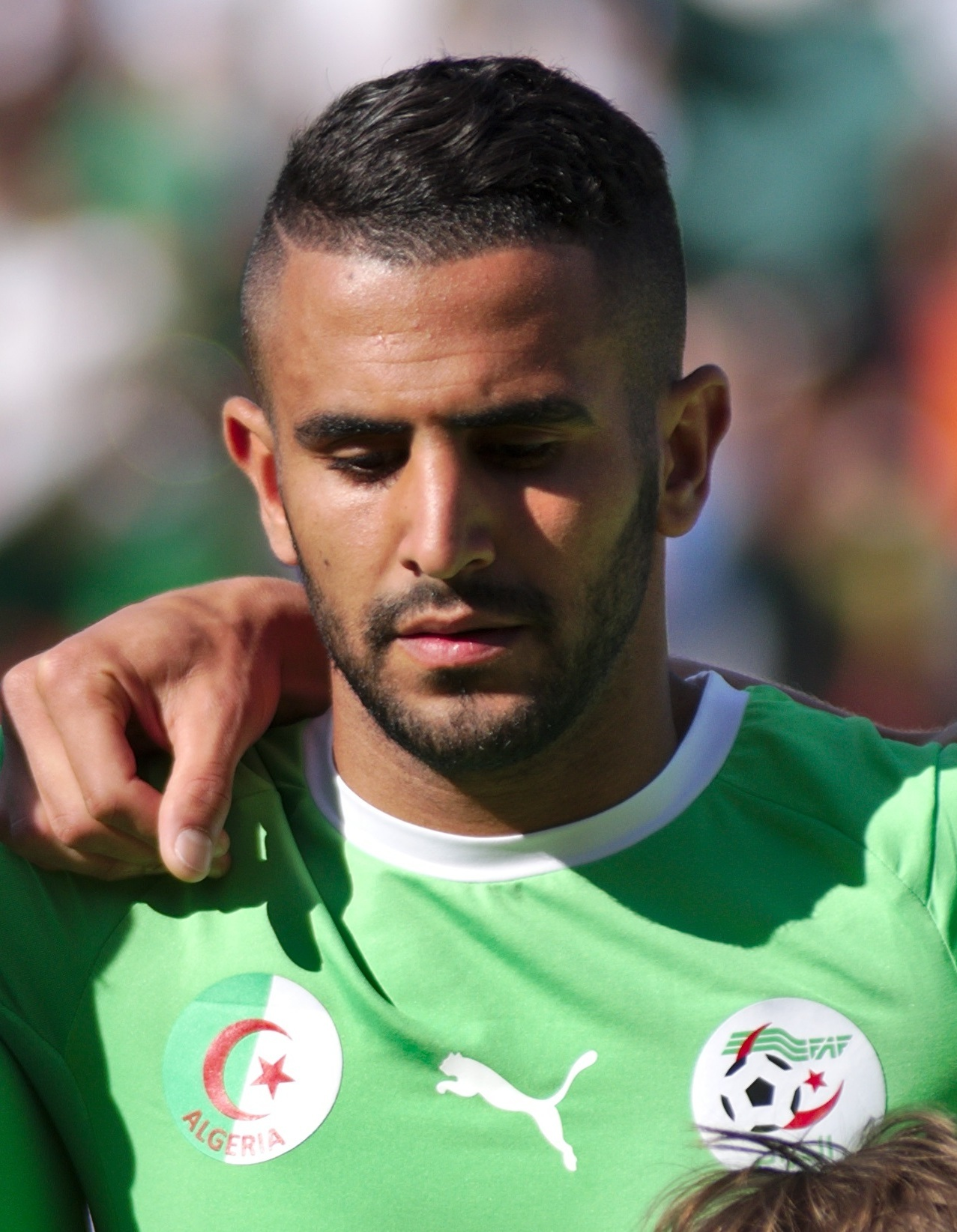 Algérie - Arménie - 20140531 - Riyad Mahrez